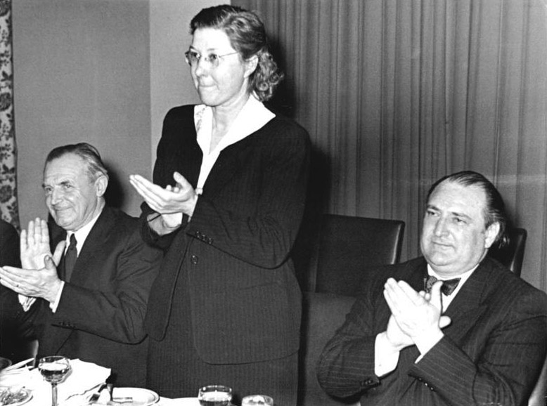 Zentralbild-Höhne-Pohl Wjt-Ho. 1 Motiv 25.3.1954 Aus Paris und Westdeutschland zurück Die Dresdener Staatskapelle ist nach ihren grossen Erfolgen in Paris und Westdeutschland wieder in Dresden eingetroffen. Für das Ministerium für Kultur begrüsste Frau Maria Rentmeister, Hauptabteilungsleiterin im Ministerium für Kultur der Deutschen Demokratischen Republik, die Mitglieder der Dresdener Staatskapelle und den Staatskapellmeister, Nationalpreisträger Franz Konwitschny (rechts), (links) Stellv. Generalintendant, Schauspieldirektor Prof. Hans Finow.